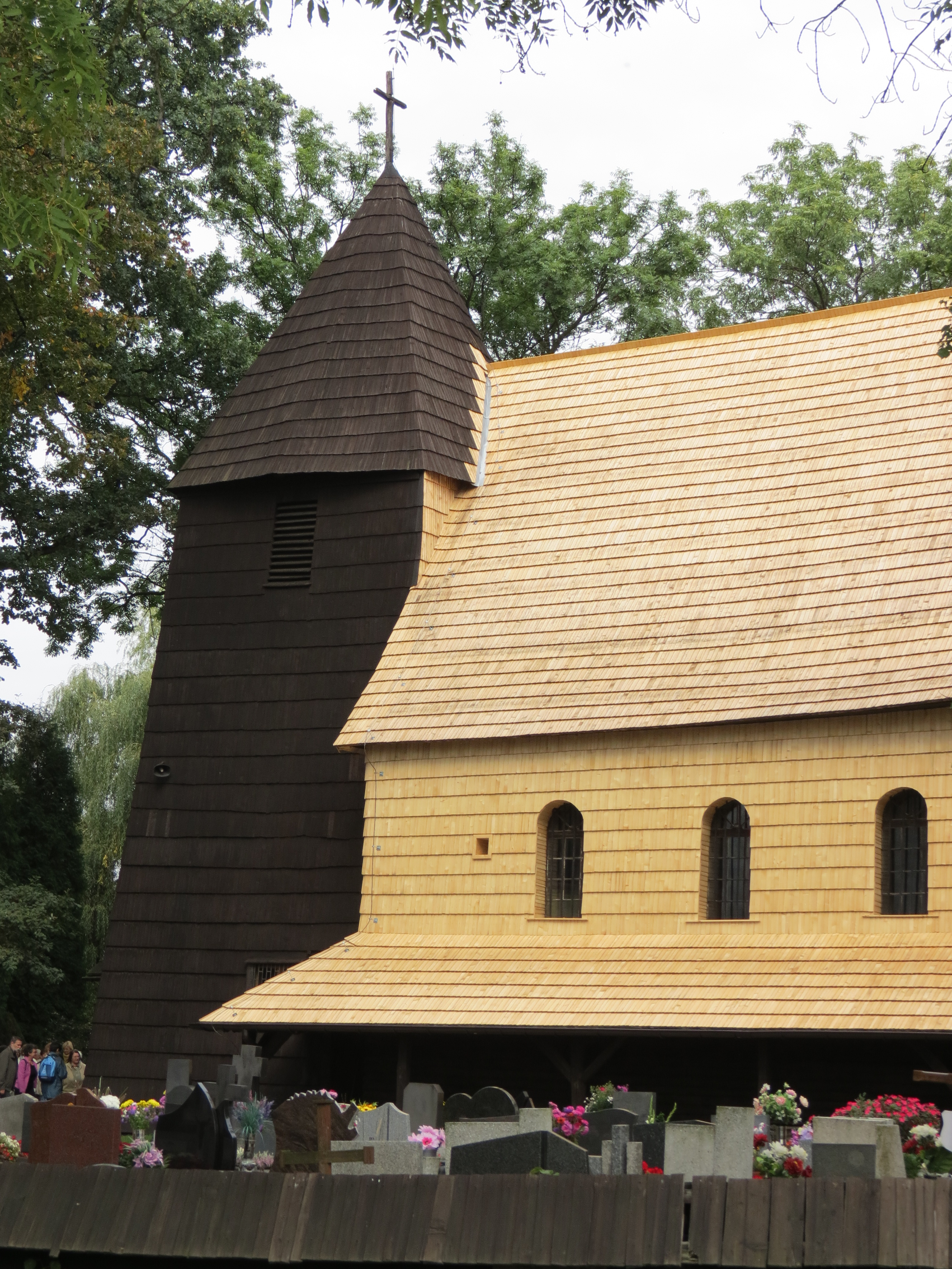 Rachowice, ul. Wiejska 9 - kościół parafialny św. Trójcy